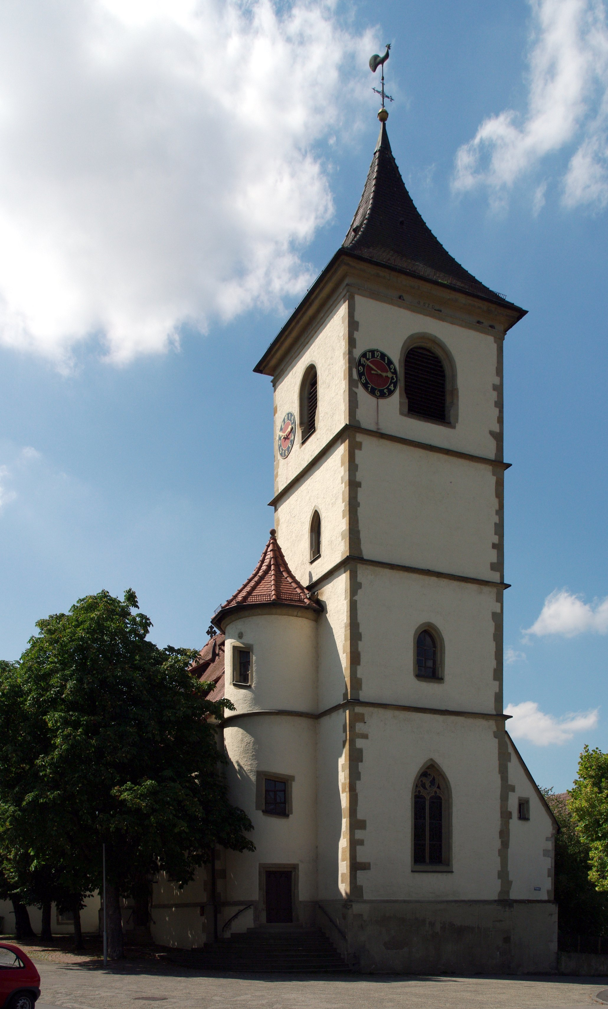 Die evangelische Pfarrkirche in Unterriexingen